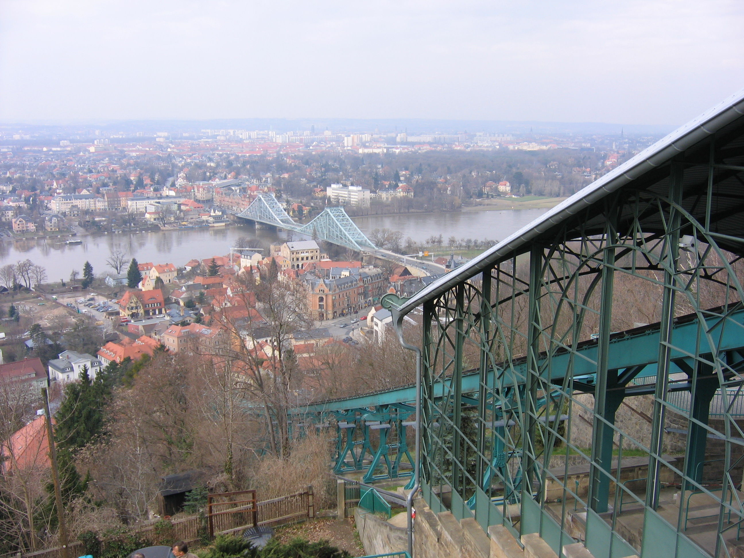 Sicht von Bergstation der Schwebebahn Dresden auf Blaues Wunder